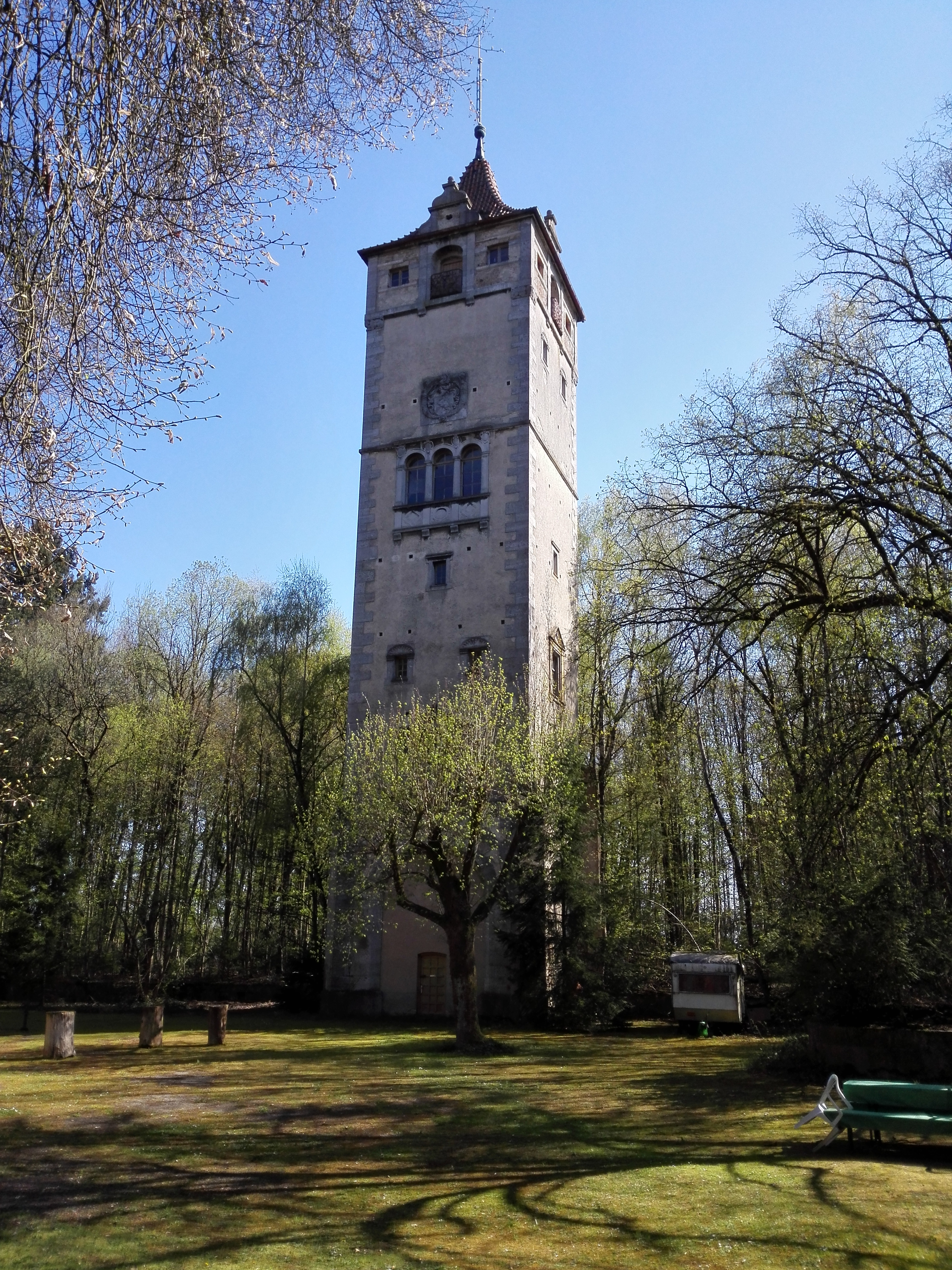 Der Hauptturm der vom Brand verschont wurde 2015